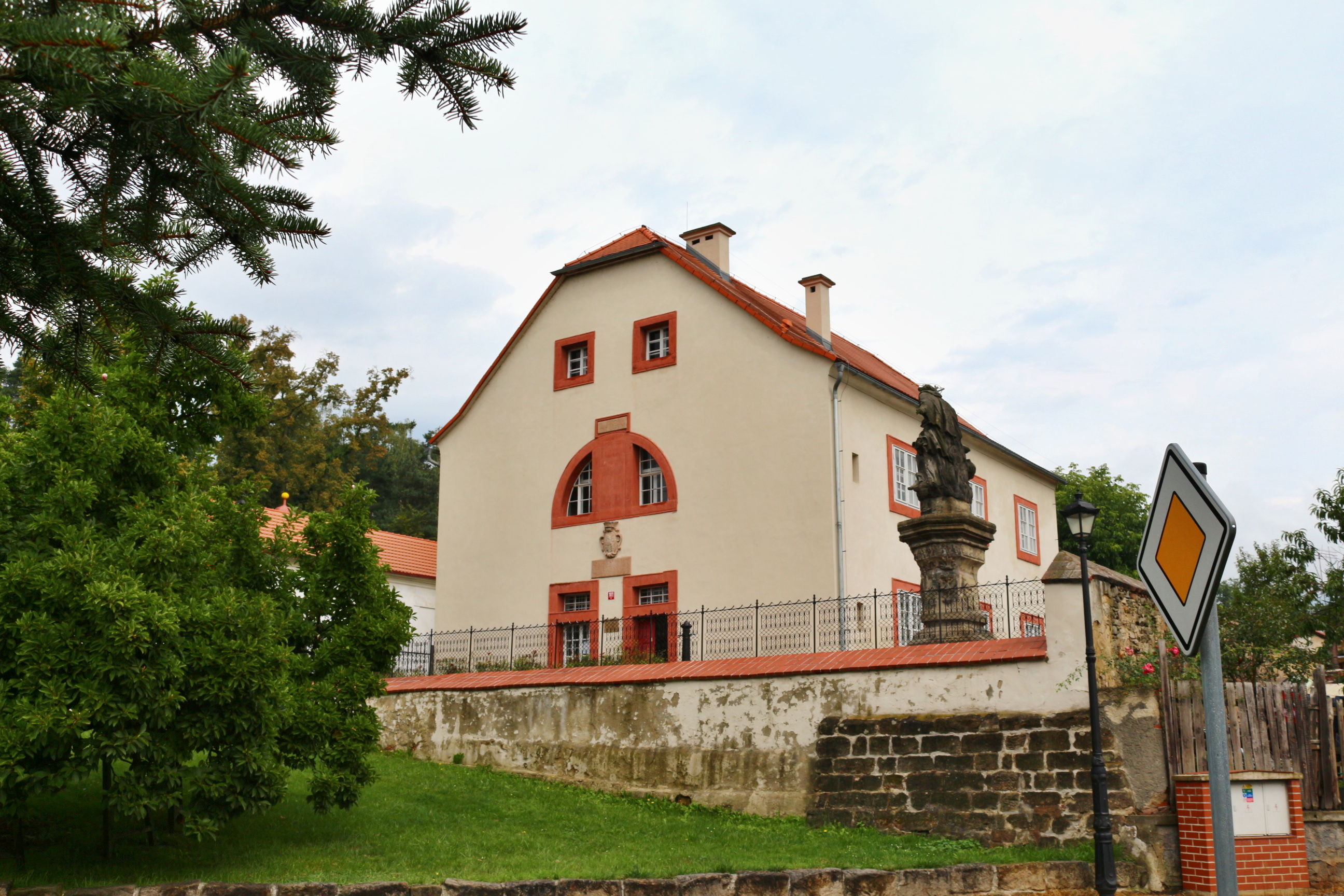 Mimoňský špitál, dnes Městské muzeum v Mimoni